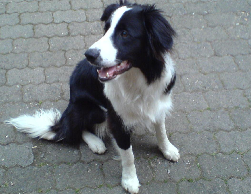 Junger Border Collie „Bob“